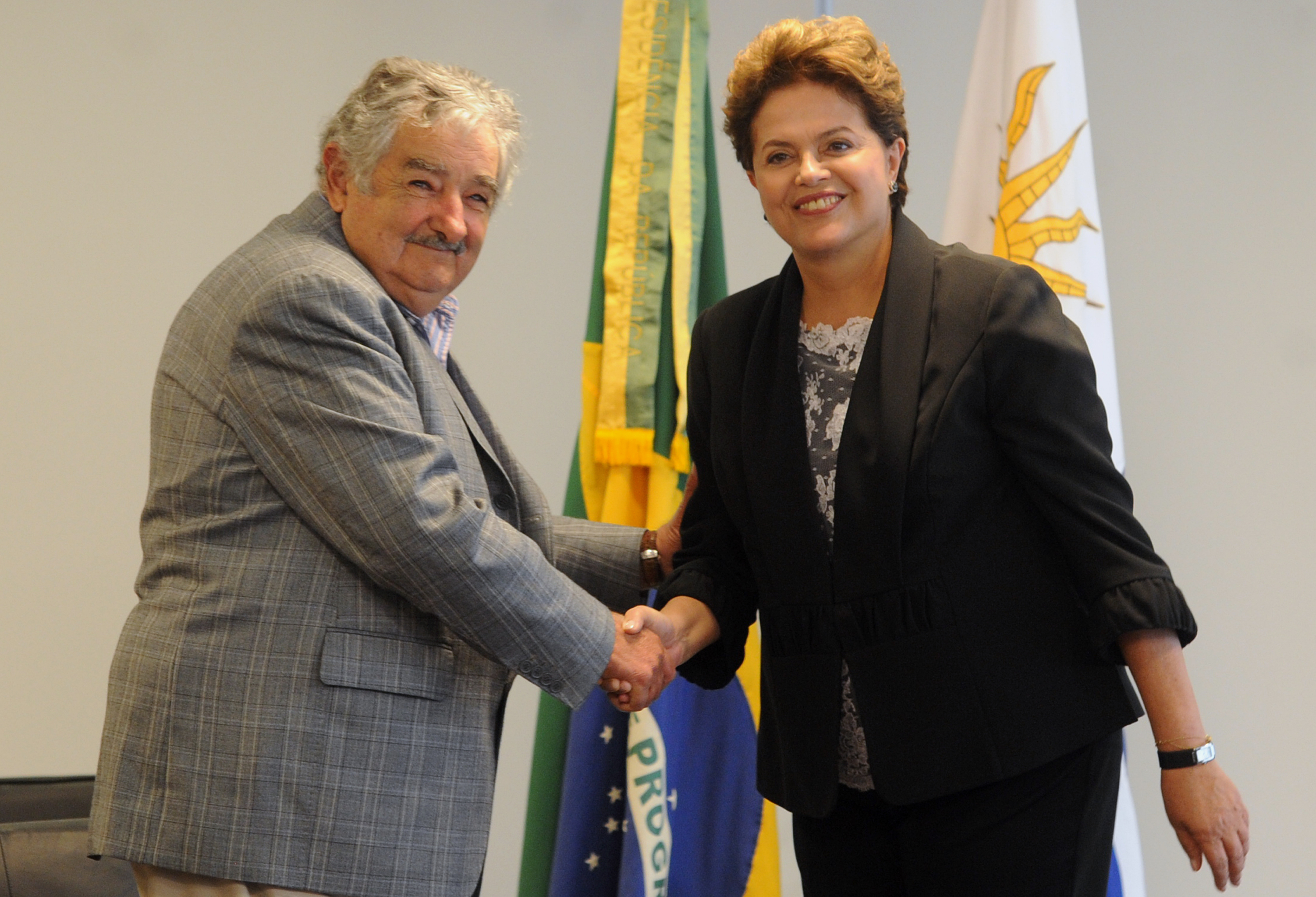 Brasília - A presidenta Dilma Rousseff recebe o presidente do Uruguai, José Mujica, no Palácio do Planalto. Brasília, 2 de janeiro de 2011.